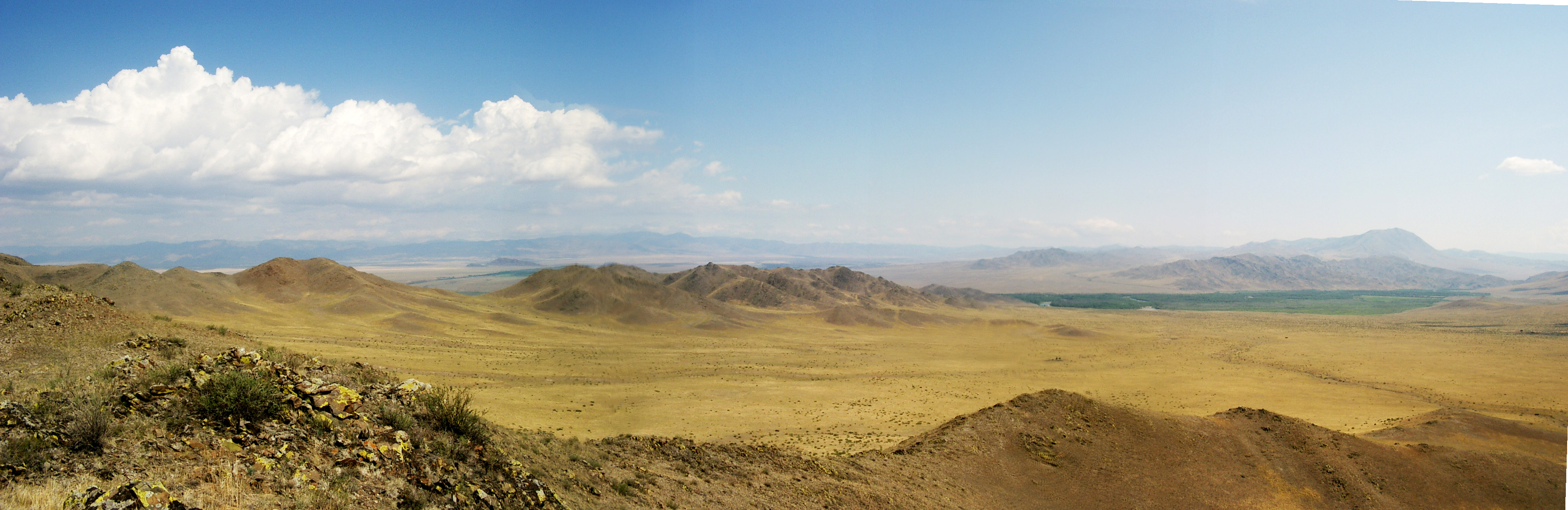 Карашатский участок